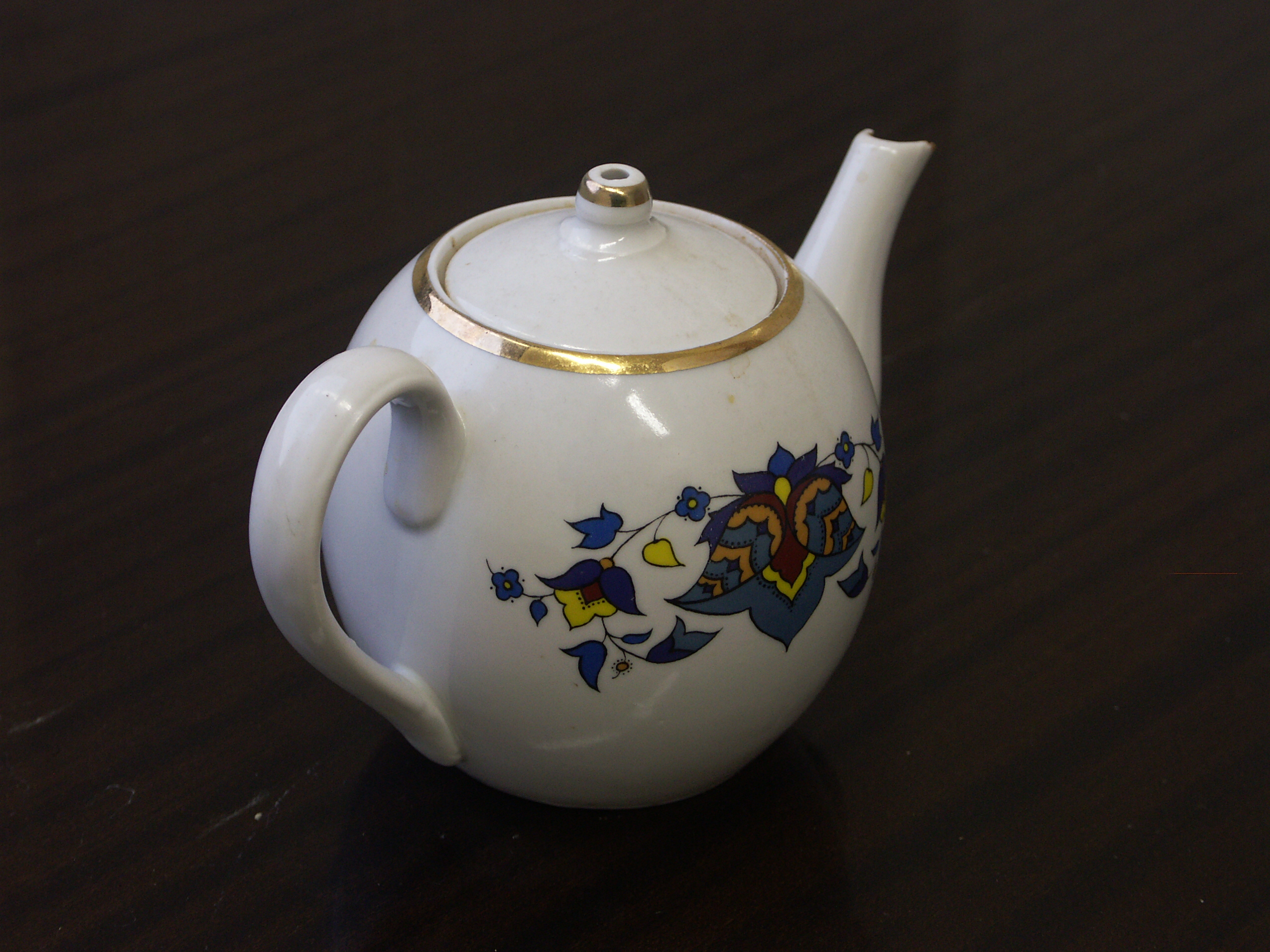 Заварной чайник Автор: User:Glaue2dk Дата: 2006-04-29